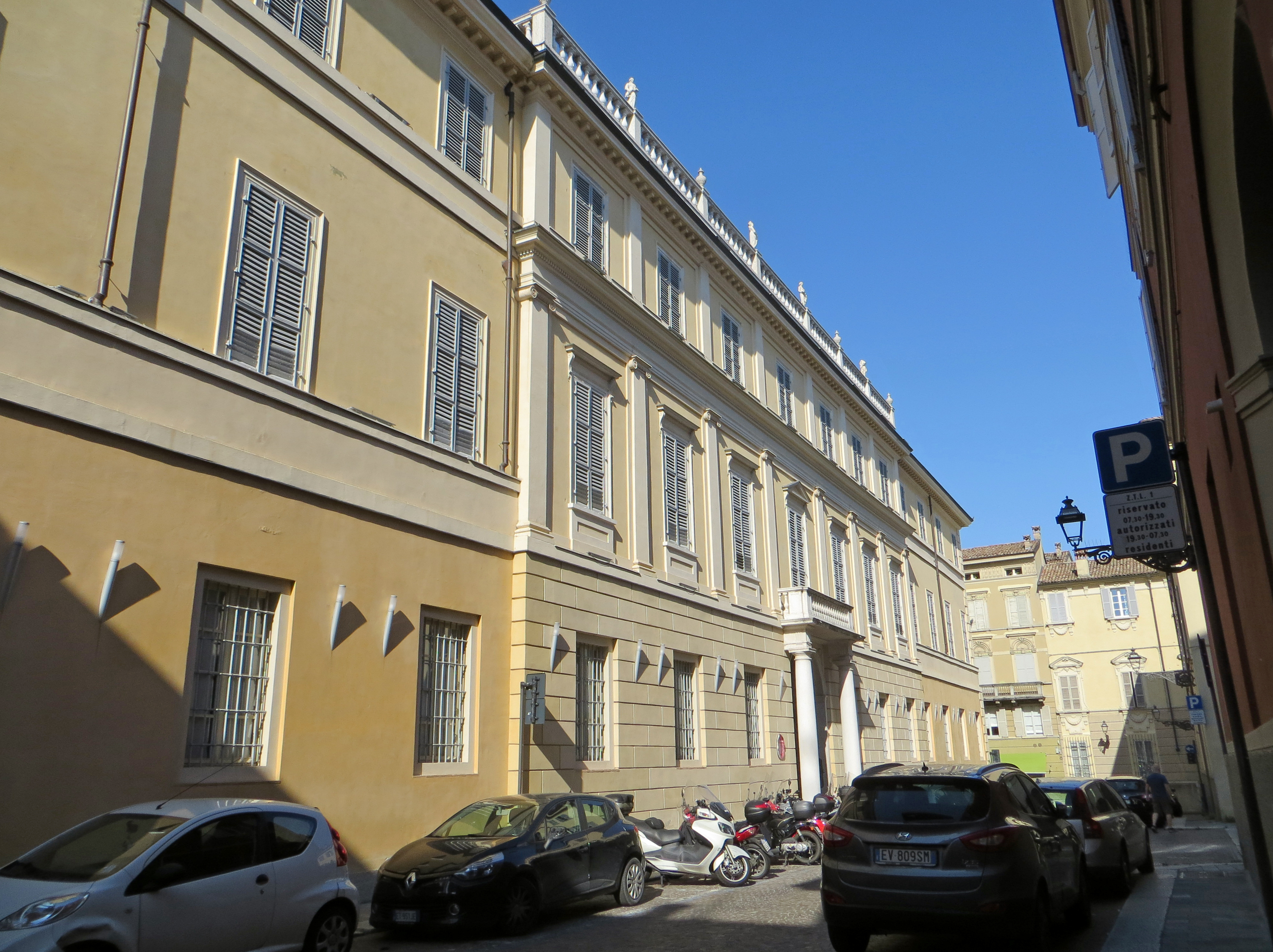 Palazzo Sanvitale (Parma) - facciata